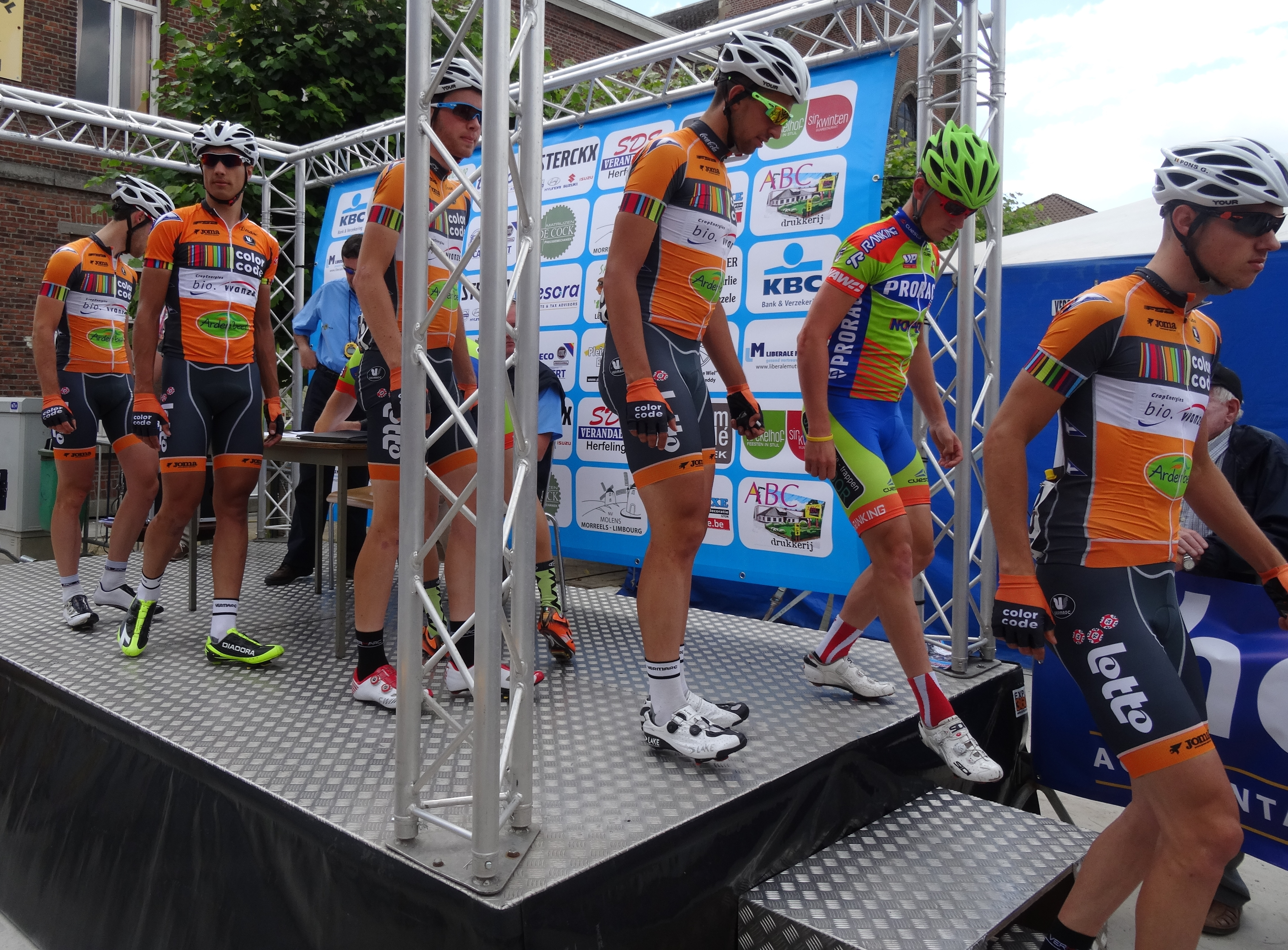 Reportage photographique réalisé le mercredi 25 juin à l'occasion du départ et de l'arrivée de l'Internationale Wielertrofee Jong Maar Moedig 2014 à Oetingen (Gooik), Belgique.